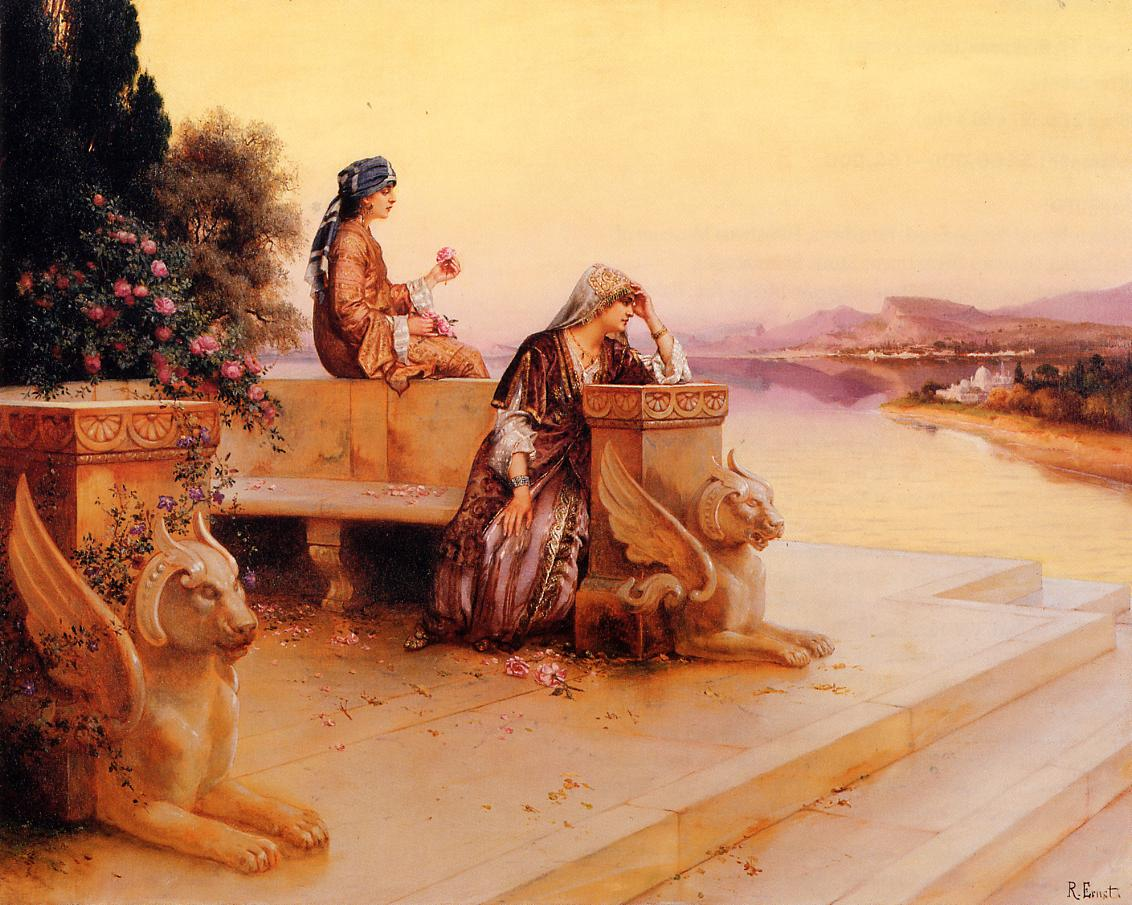 Elegant Arab Ladies on a Terrace at Sunset